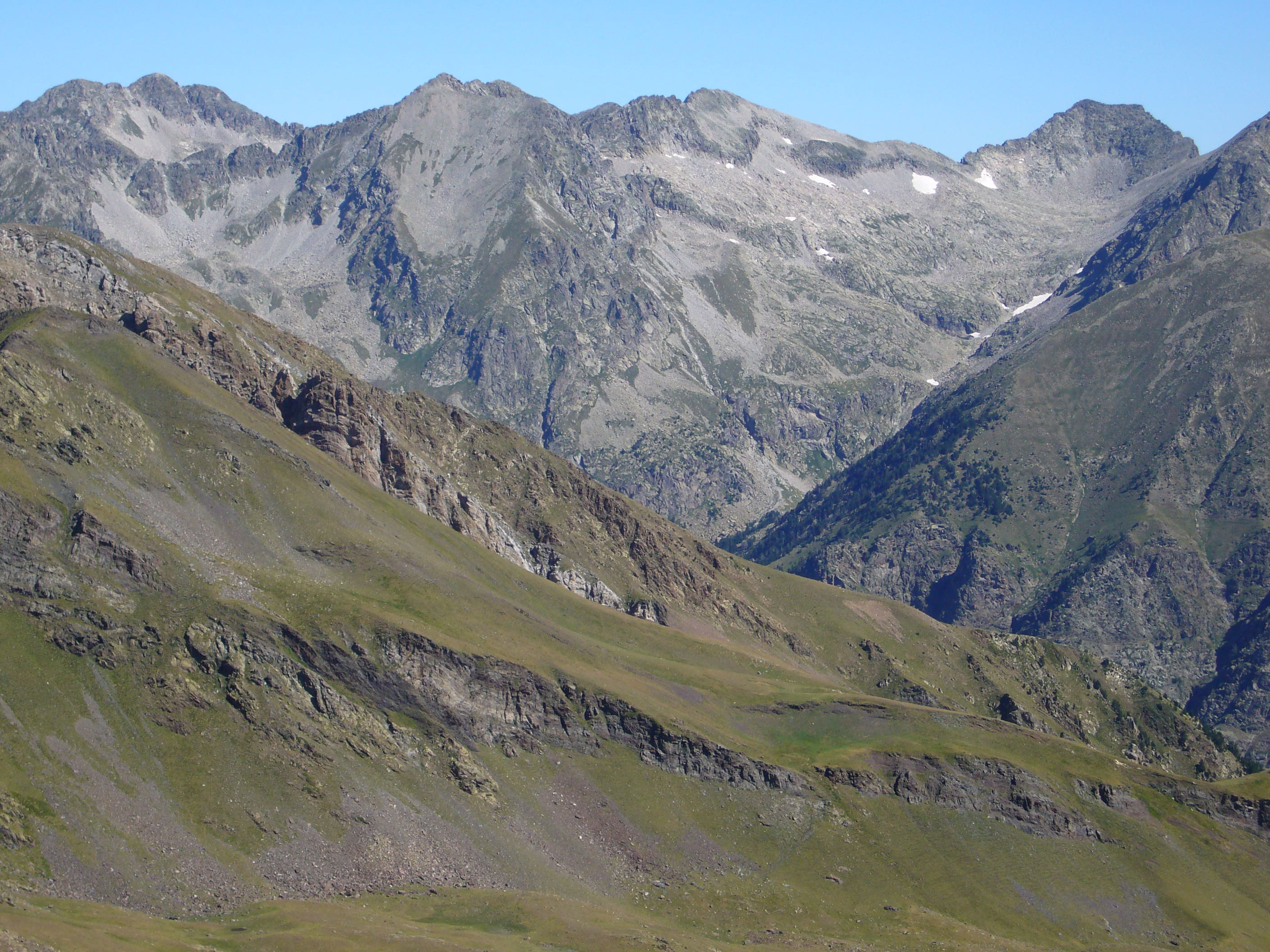 Vall de Sarradé vist des del Tuc de Carants; la Vall de Boí, Alta Ribagorça, Catalunya.